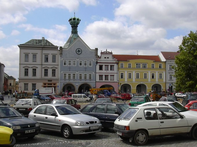 Litoměřické Mírové náměstí s radnicí („Dům Kalich“ nebo také „Pod bání“).